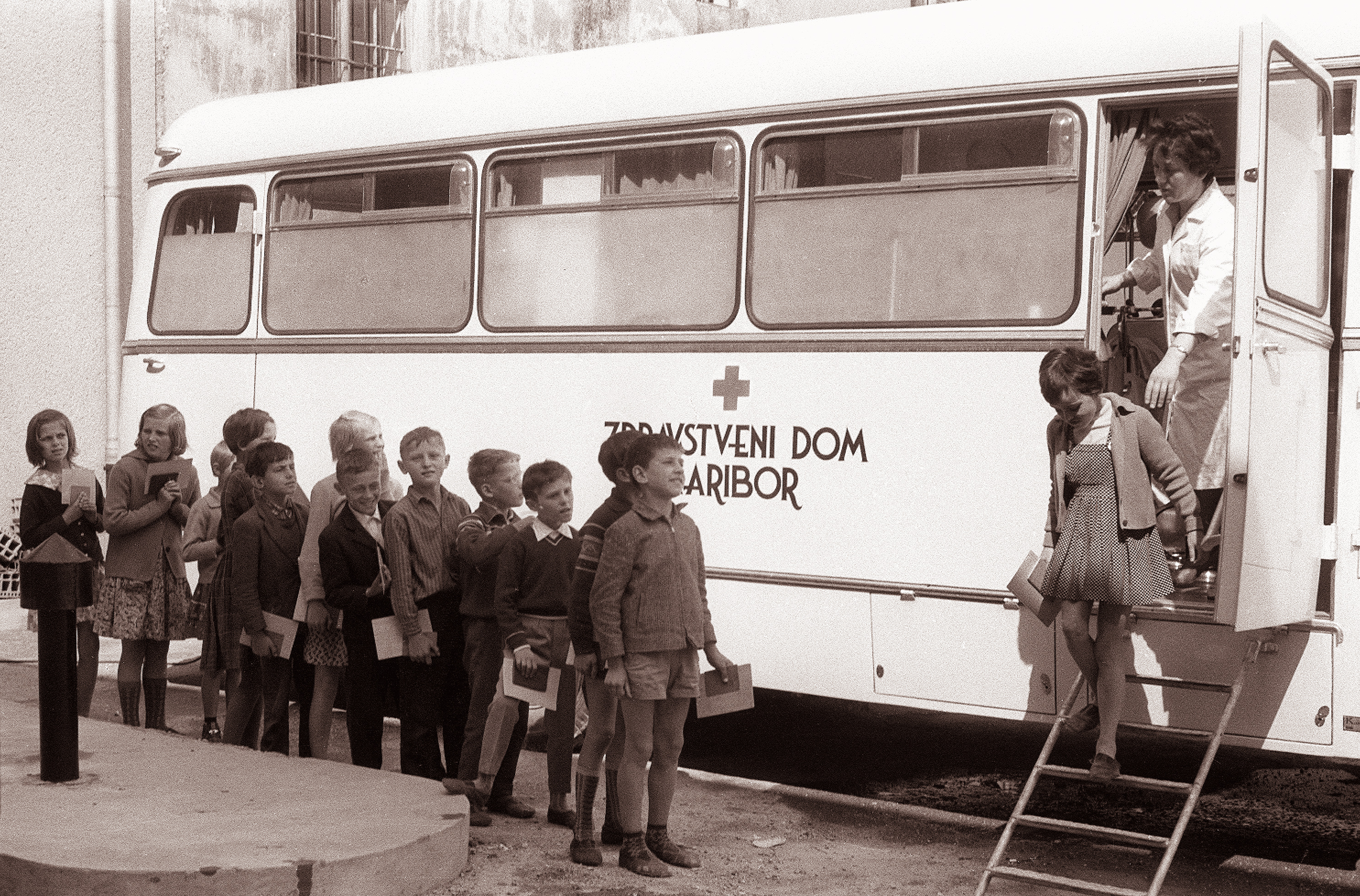 Šolarji iz tretjega razreda v Račah, čakajo na pregled pred avtobusom - ambulanto ZD Maribor.